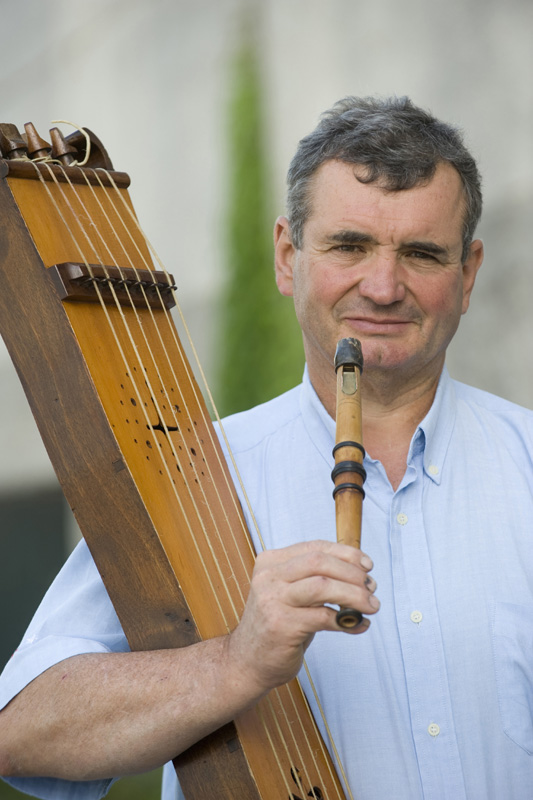 Jean Mixel Bedaxagar (2009)